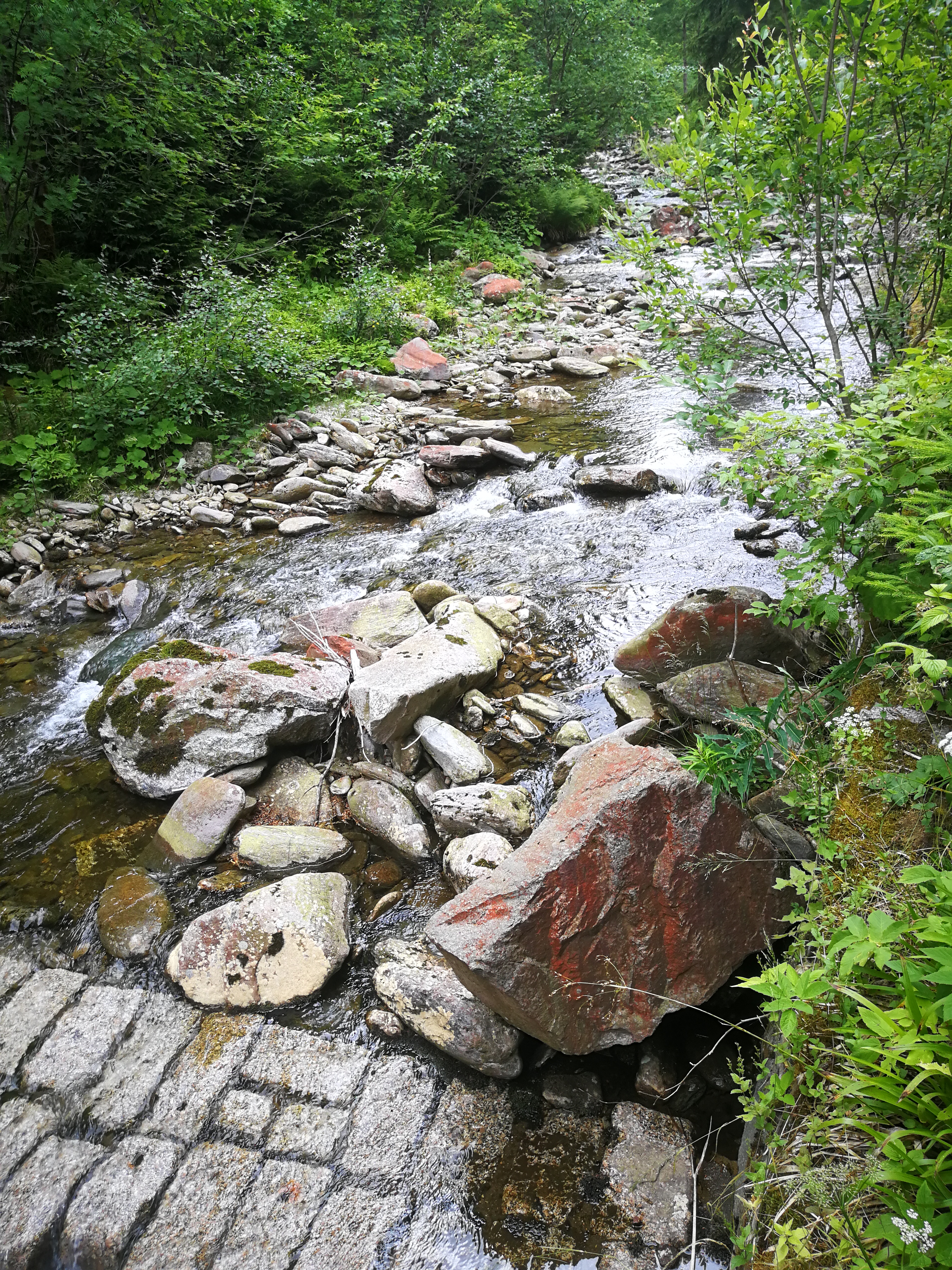 Jelení potok (přítok Malé Úpy)